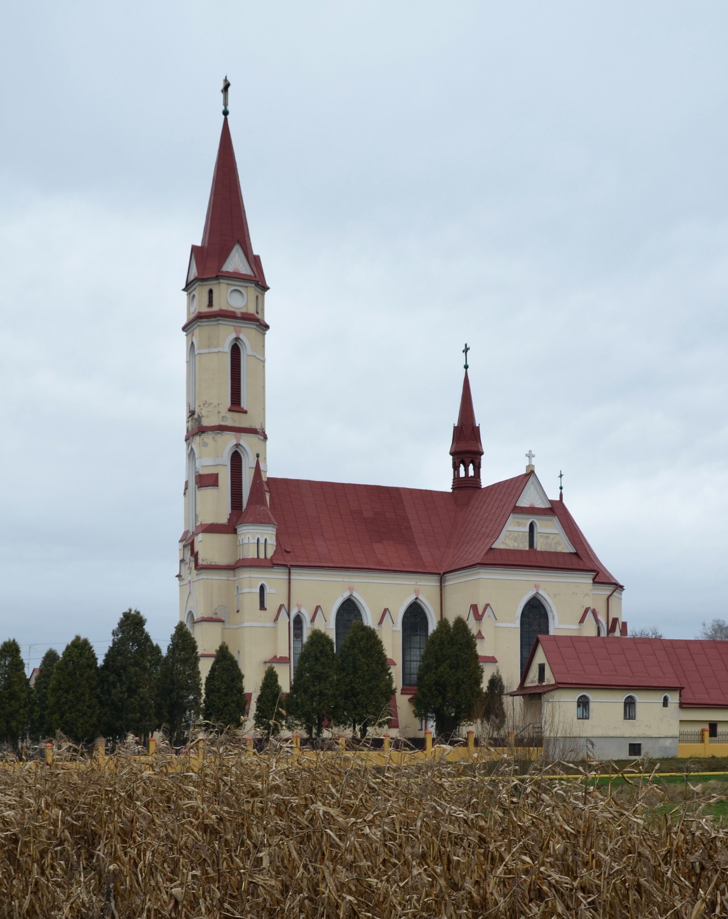 Костел у селі Волиця Мостиського району.